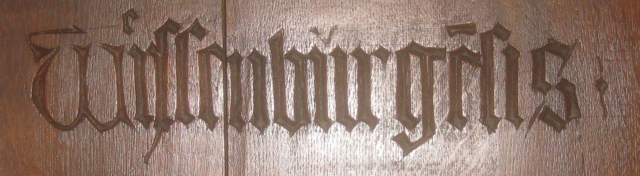 Chorgestühl der Leonhardskirche, Südostfassade, vordere Sitzreihe, linke Hälfte, Inschrift „Wissemburgēsis“ (ē = en, Weißenburg) an der Rücklehne von Sitz 6.